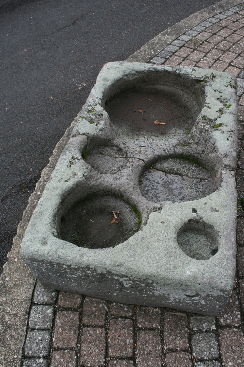 Pierre de dime, Place de l'Orme à Chatel-Guyon.